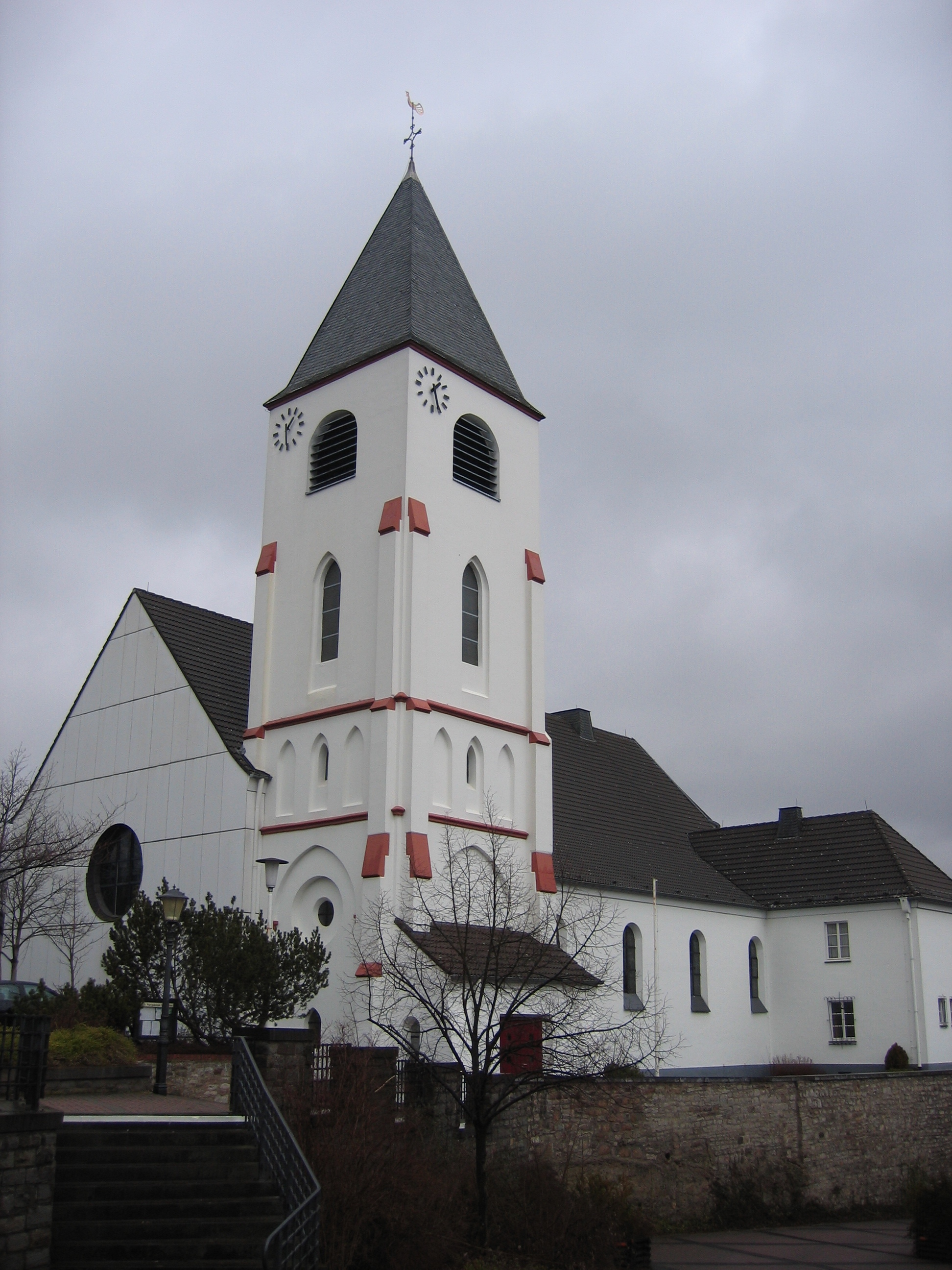 St.-Nikolaus-Kirche in Kall